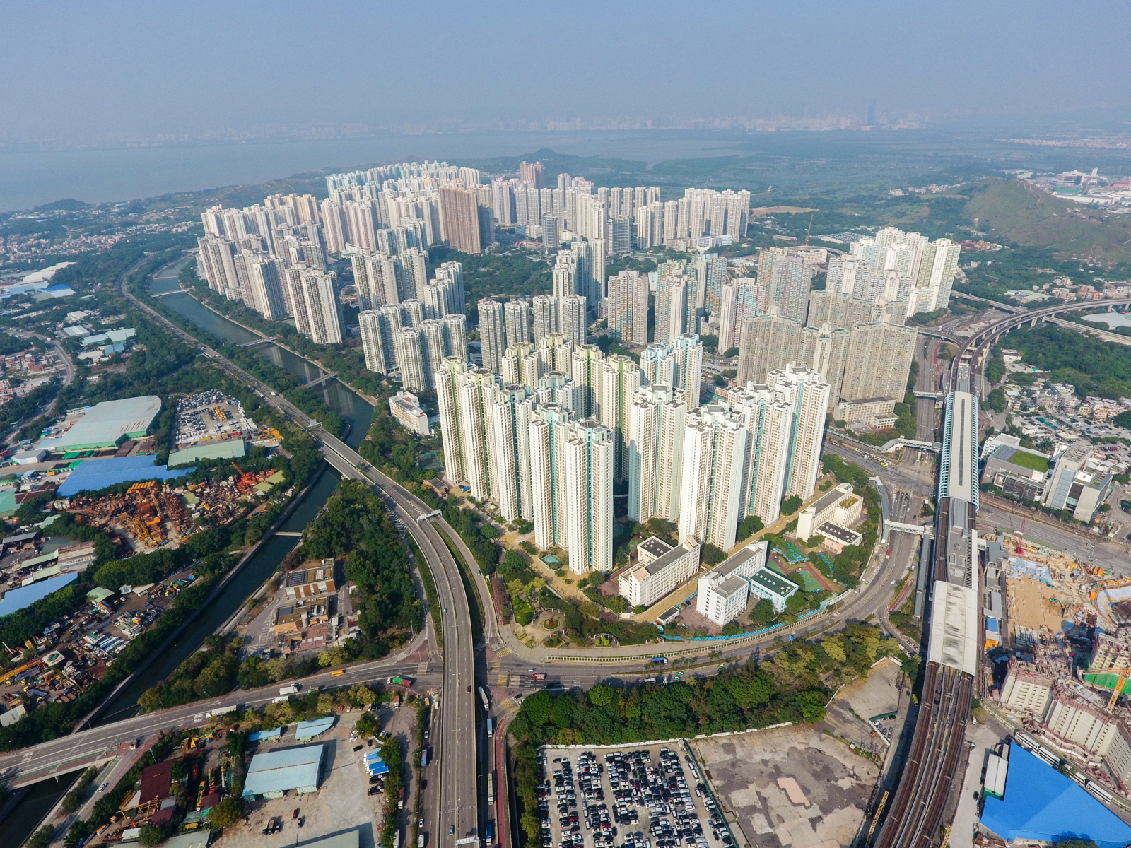 Tin Shui Wai Overview